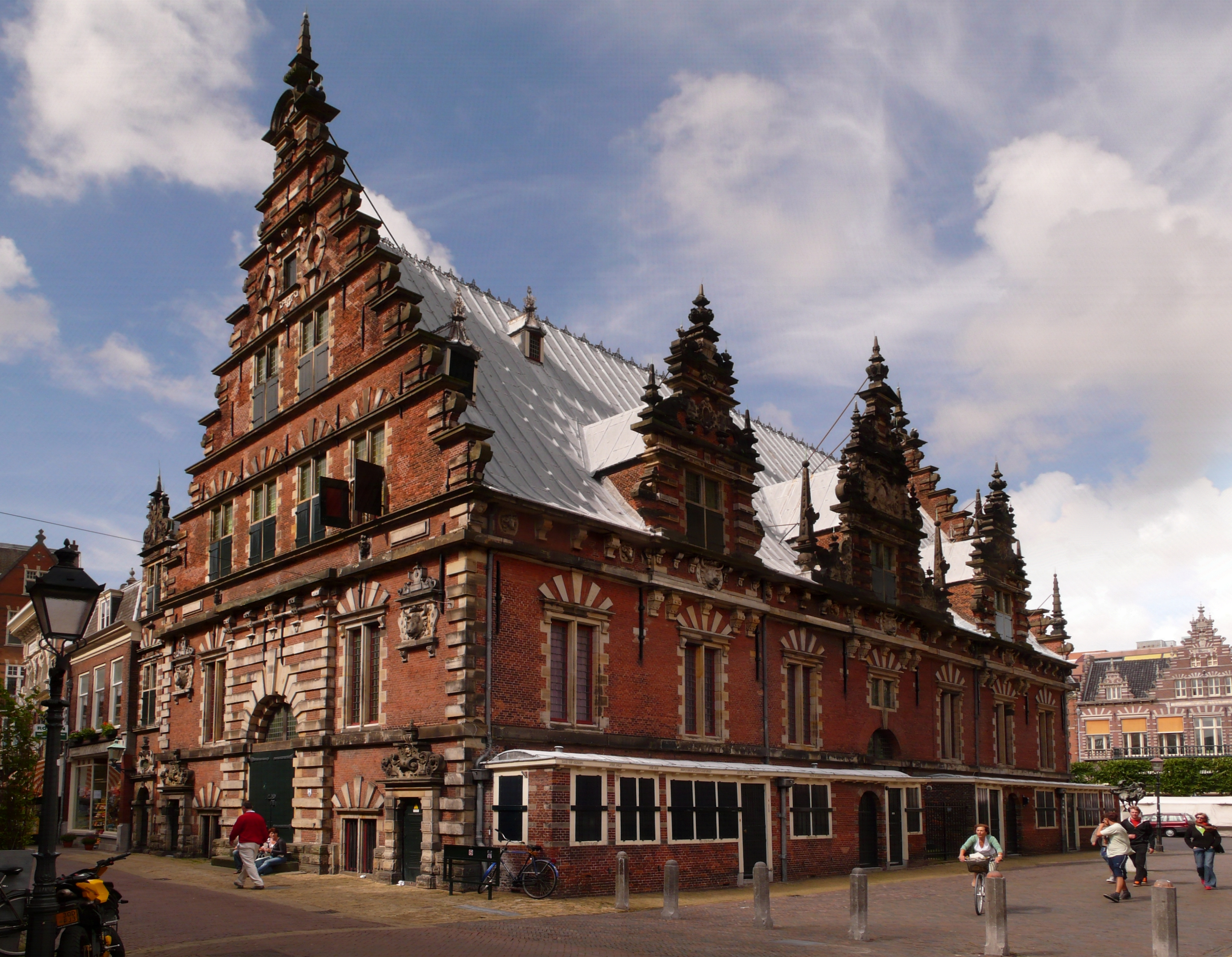 Vleeshal in Haarlem, Niederlande